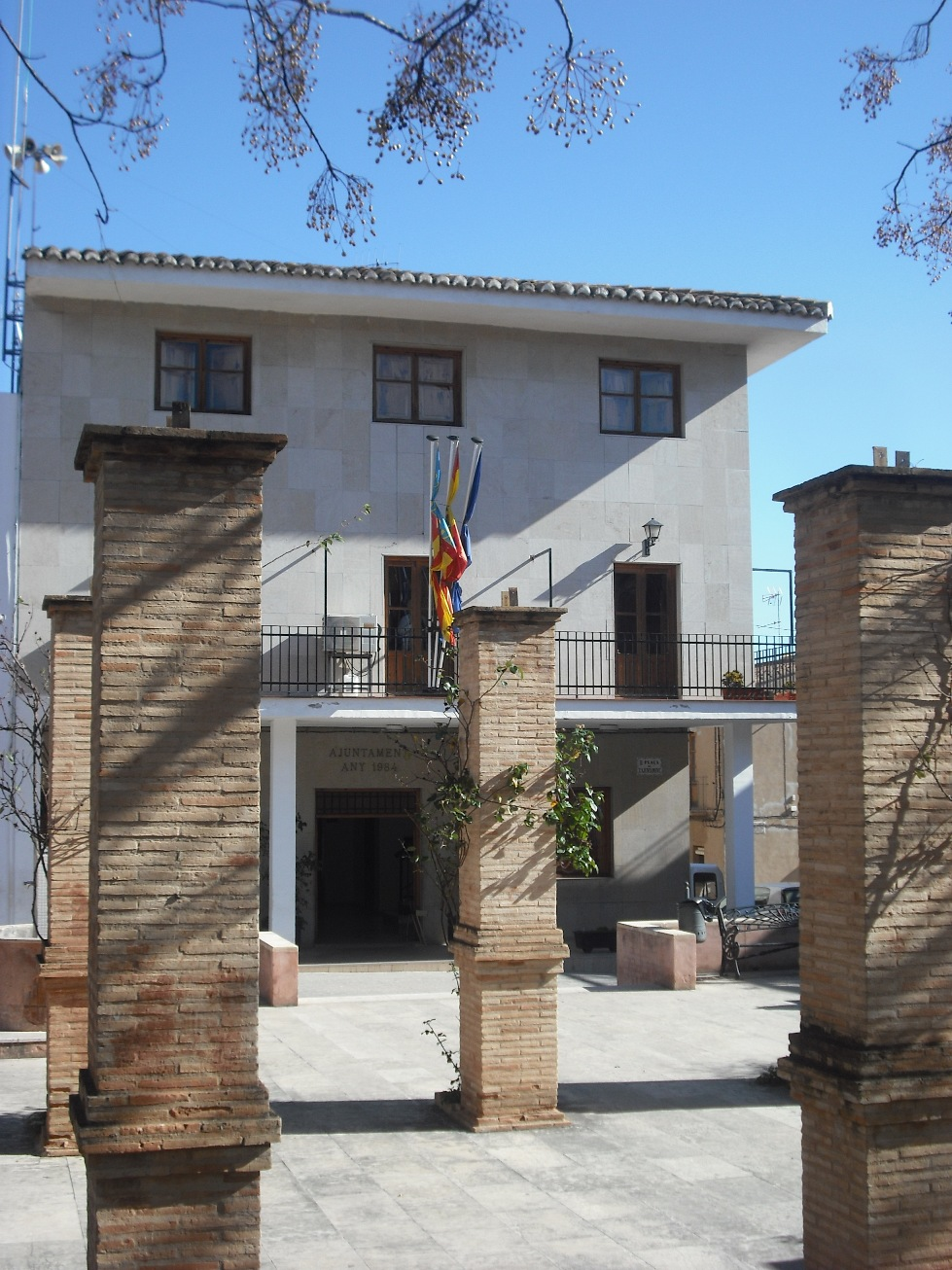 Ayuntamiento de Benifairó de los Valles.